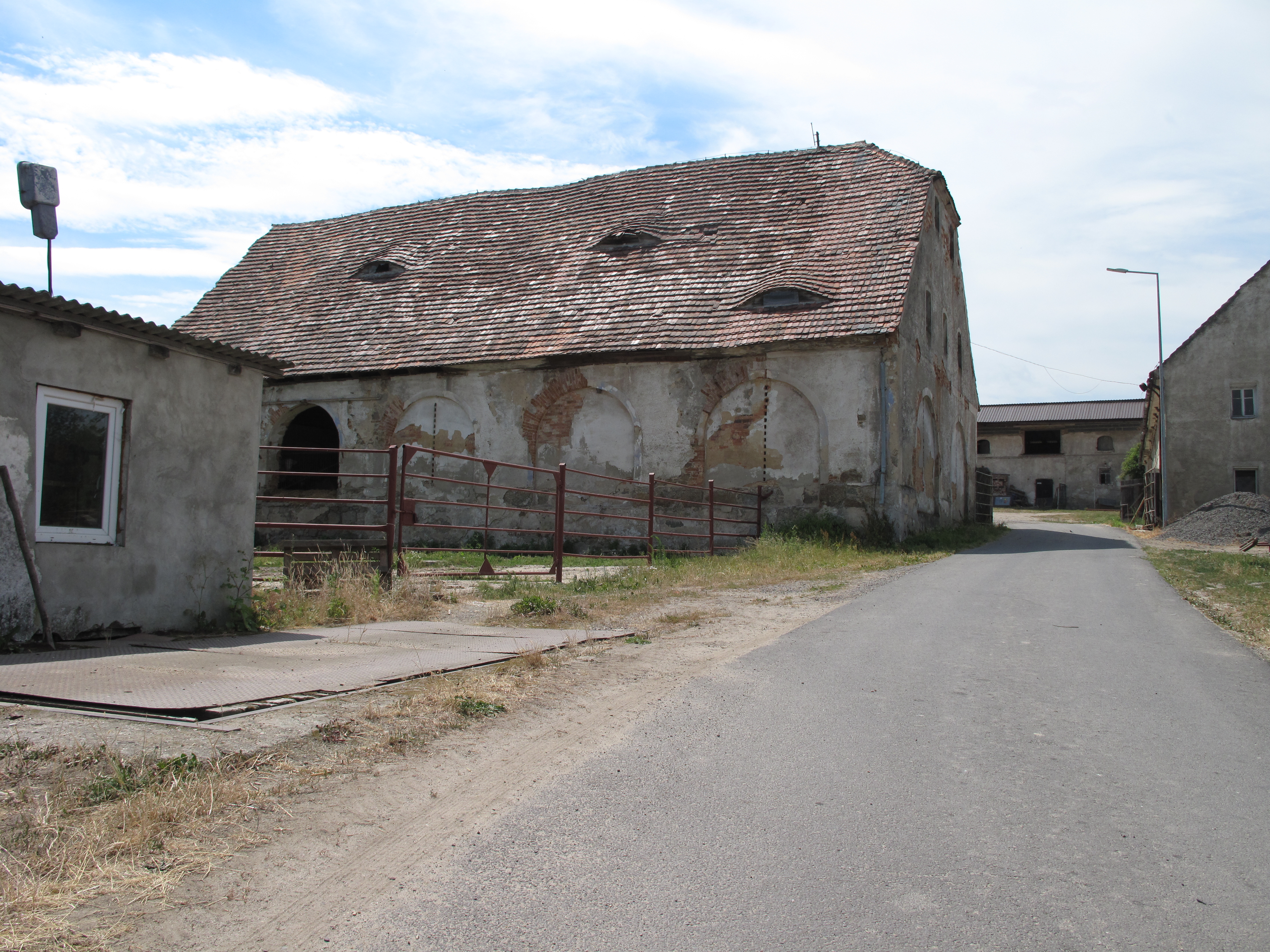 Wolanów (województwo dolnośląskie). Polska.